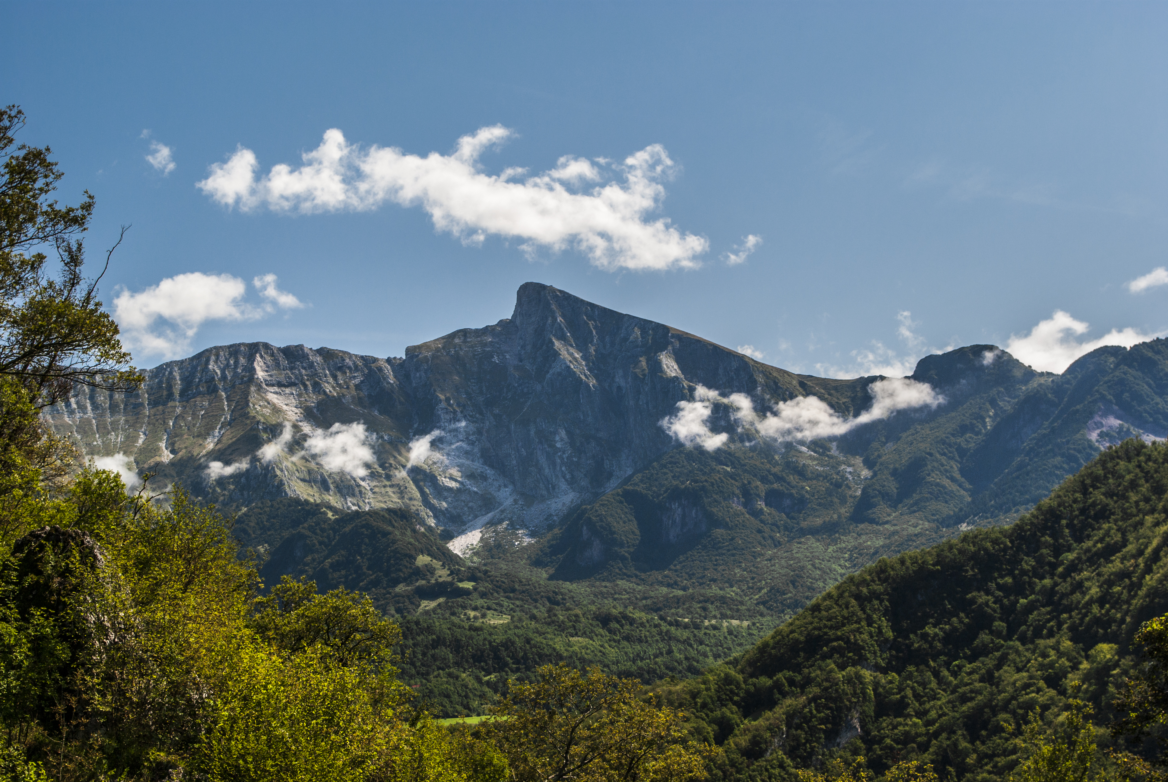 Caporetto-Kobarid